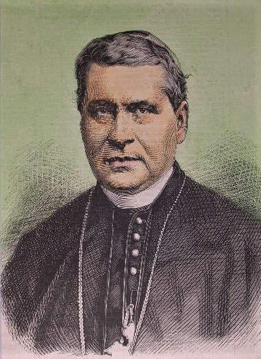 Kardinal Giovanni Simeoni, teilkolorierter Holzstich, ca. 14 x 12,5 cm